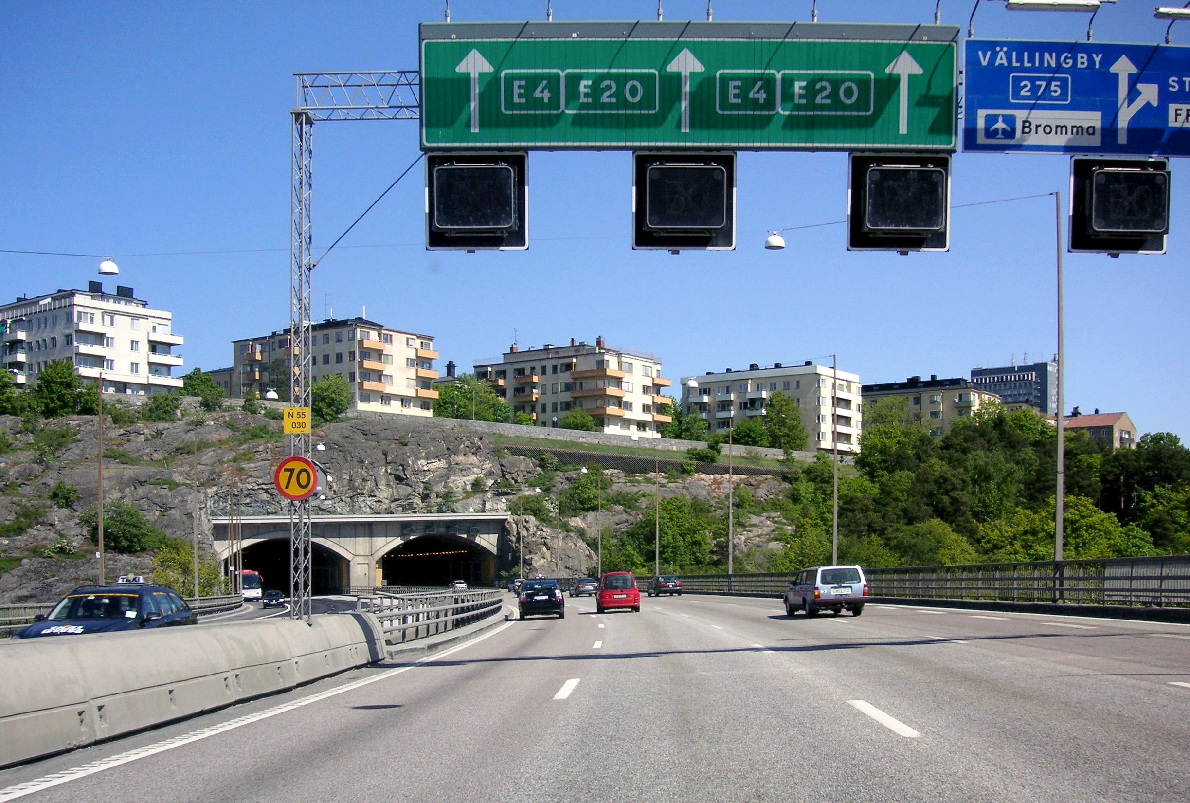 Essingeleden mot norr före Fredhällstunneln i Stockholm